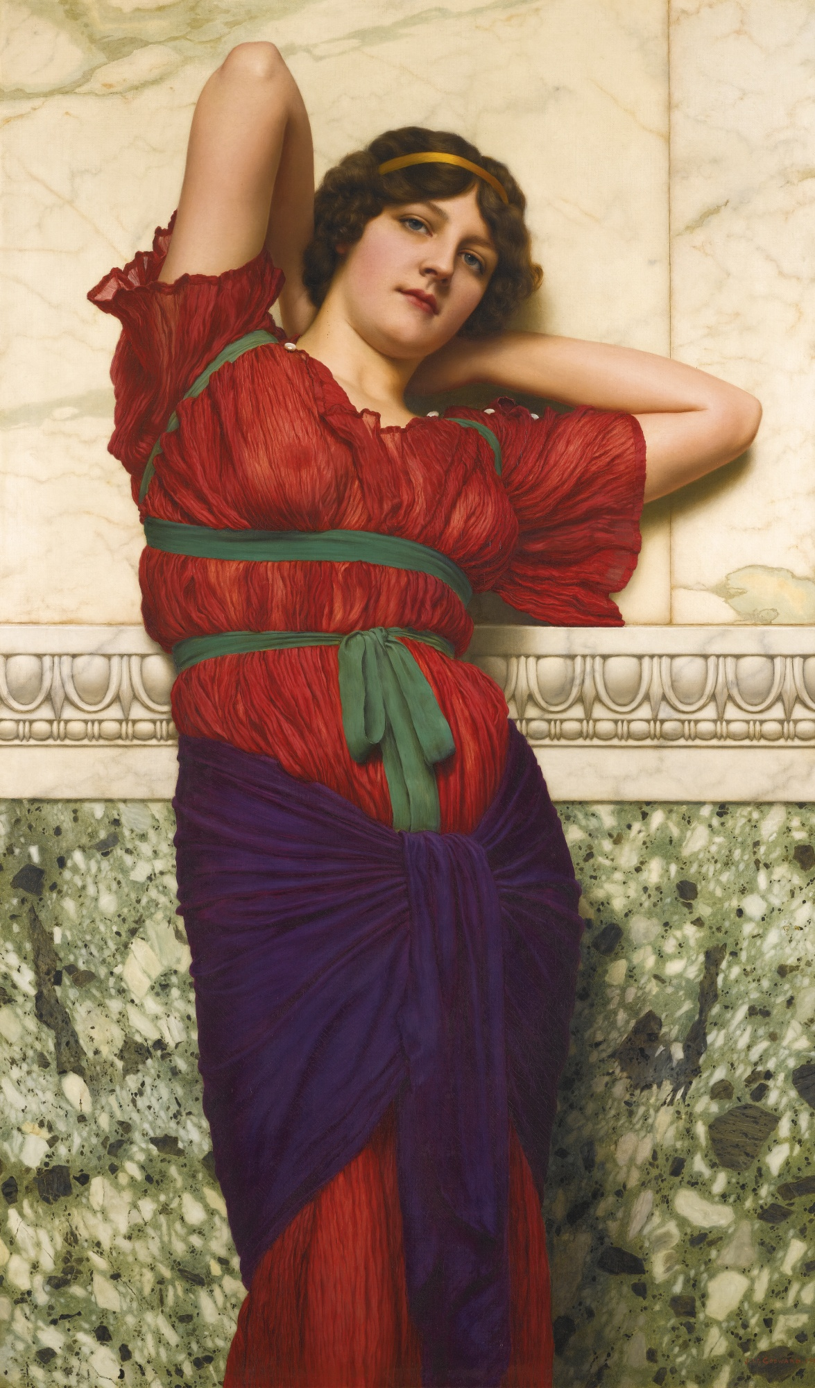 oil on canvasmedium QS:P186,Q296955;P186,Q4259259,P518,Q861259, Height: 127 cm (50 in); Width: 76 cm (29.9 in) dimensions QS:P2048,127U174728;P2049,76U174728, Private collectioninstitution QS:P195,Q768717.